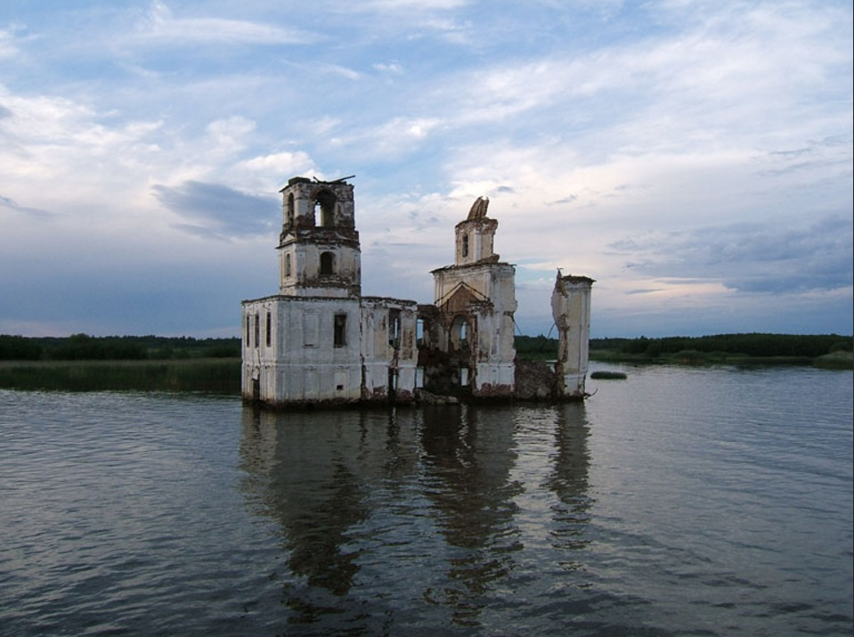 Su altında qalmış Kroxinski kilsəsi